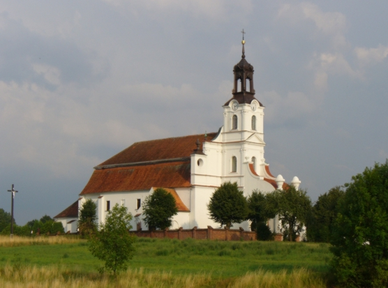 Ołobok - kościół pw. św. Jana Ewangelisty w zespole klasztornym cysterek